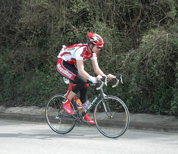 Na trasie wyścigu The Path of King Nikola 2007